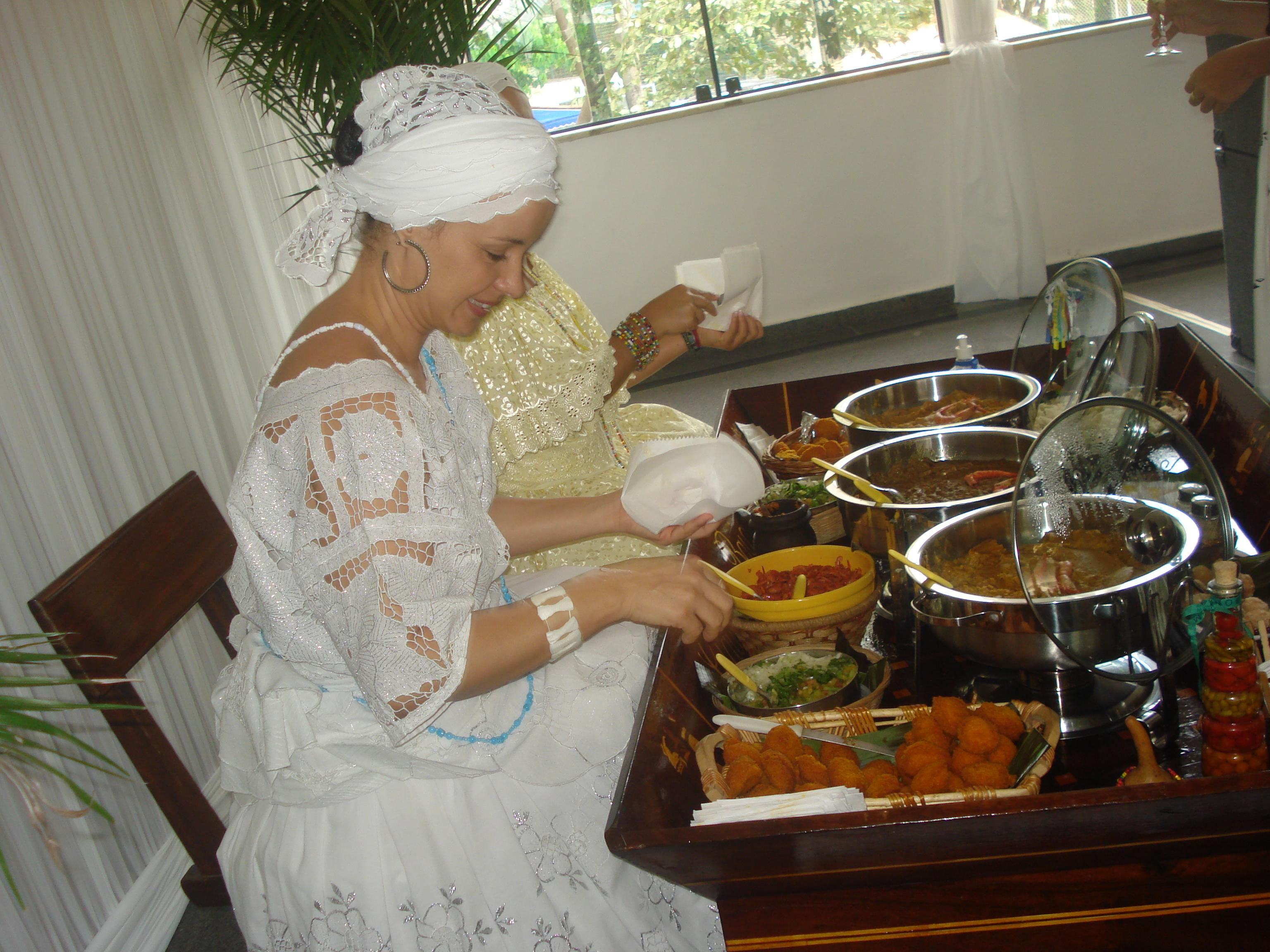 == Claudia Baiana == Description